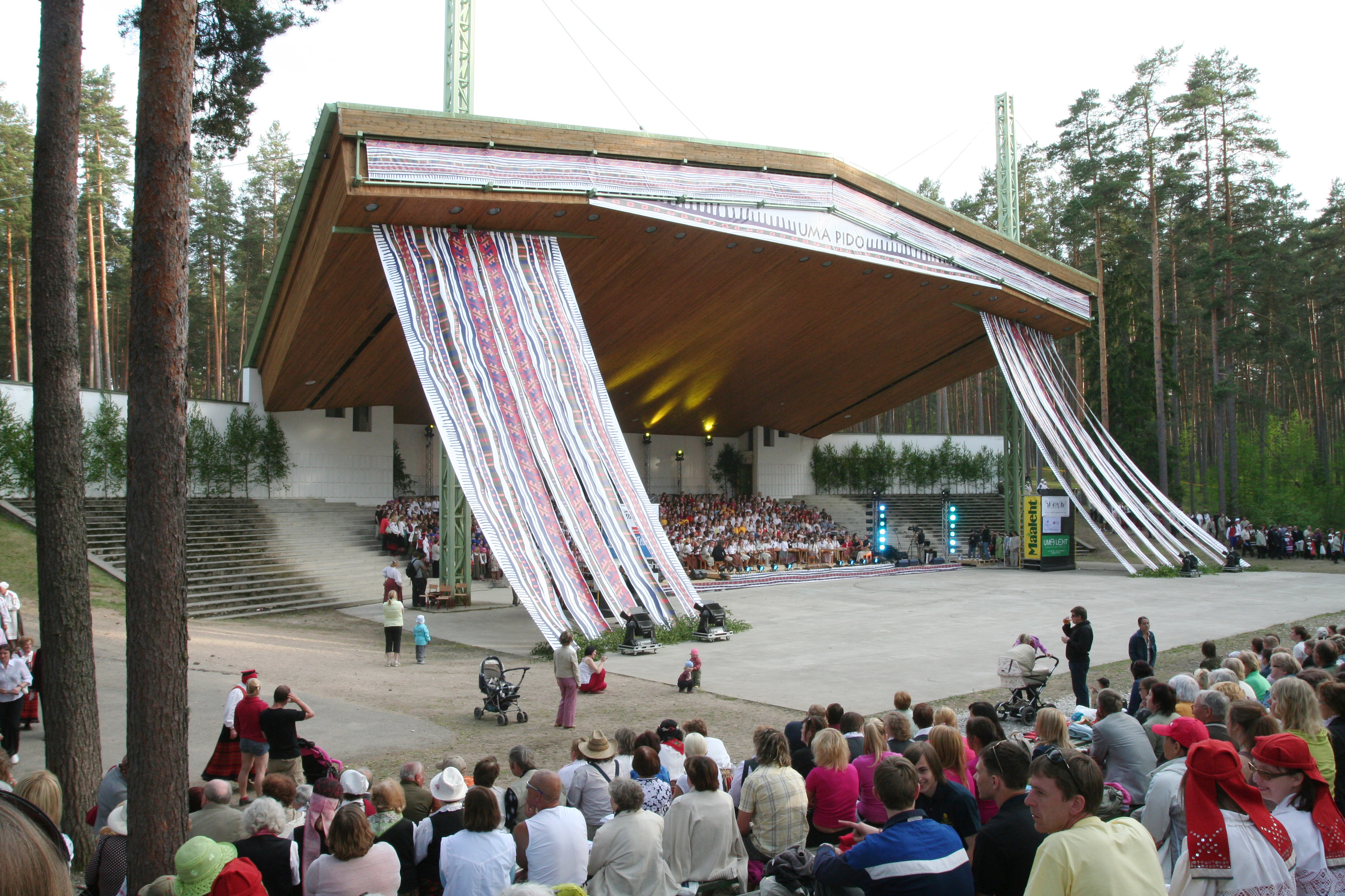 1. Uma Pido Võrus Kubija laululaval